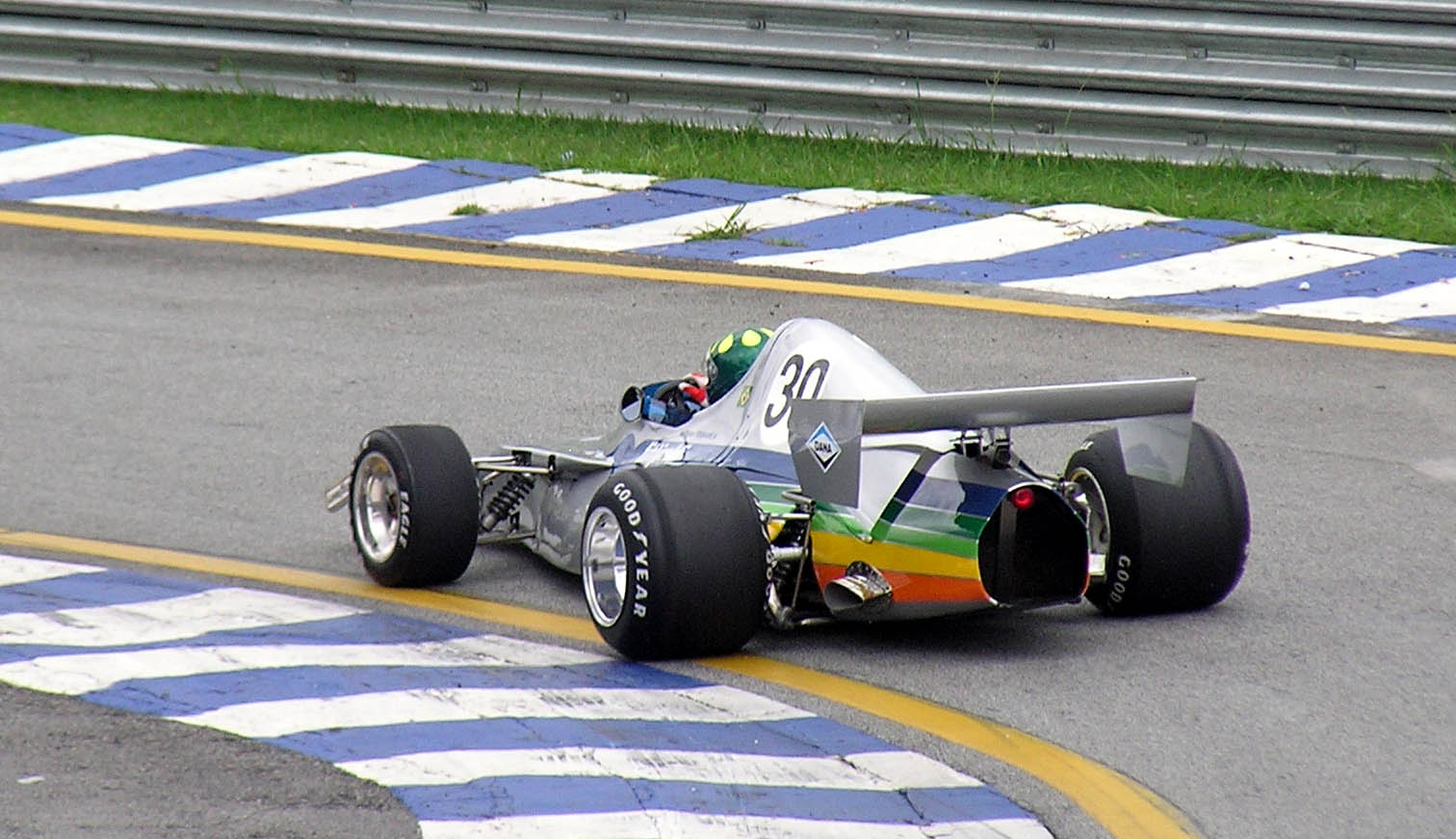 Fittipaldi FD-01 (restored) with Wilson Fittipaldi in 2007